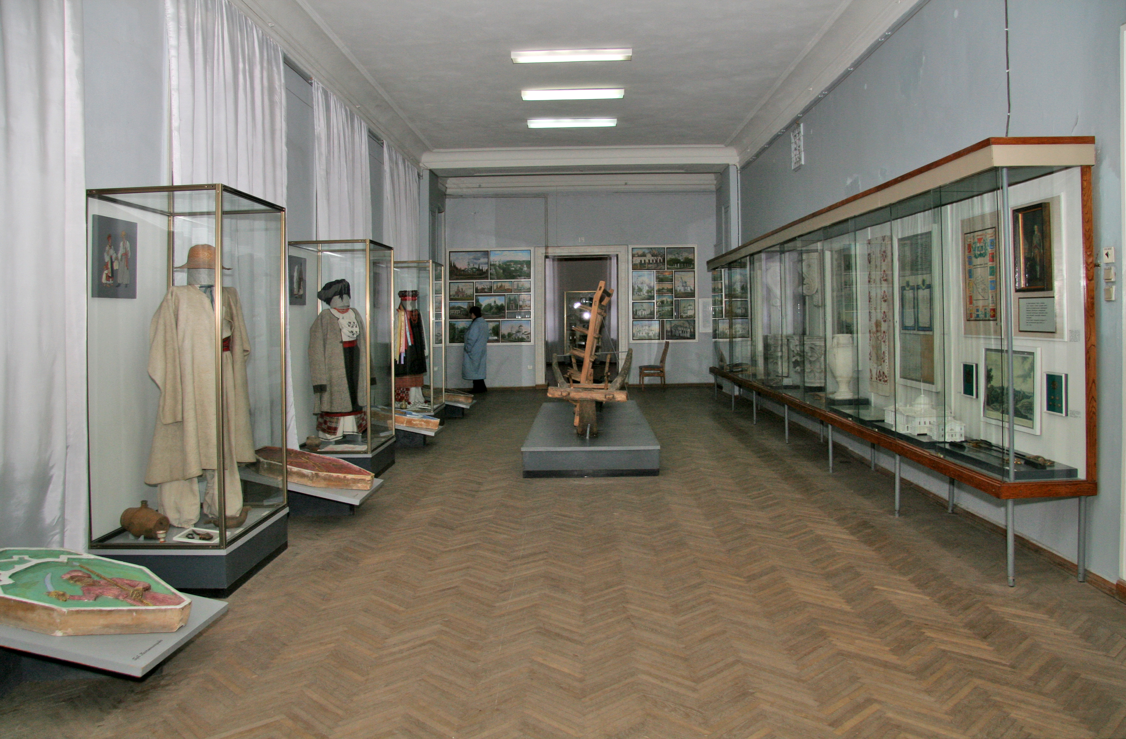 Полтавський кразнавчий музей_Зал № 11